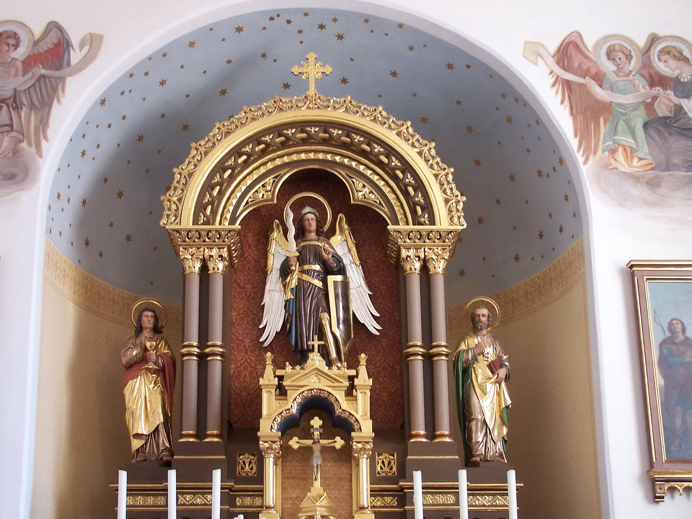 Furth in Niederbayern, Schatzhofen Nr. 14. Pfarrkirche St. Michael. Saalkirche mit Chorturm, Chor romanisch, 12. Jahrhundert, Langhaus 1687/88 von Victor Thoni, mit Lisenen- und Putzgliederung. Hochaltar im neuromanischen Stil mit zwei runden Säulenpaaren. Zentralfigur ist der Erzengel St. Michael mit Flammenschwert und Schild. Seitenfiguren St. Johannes ev. und St. Petrus.